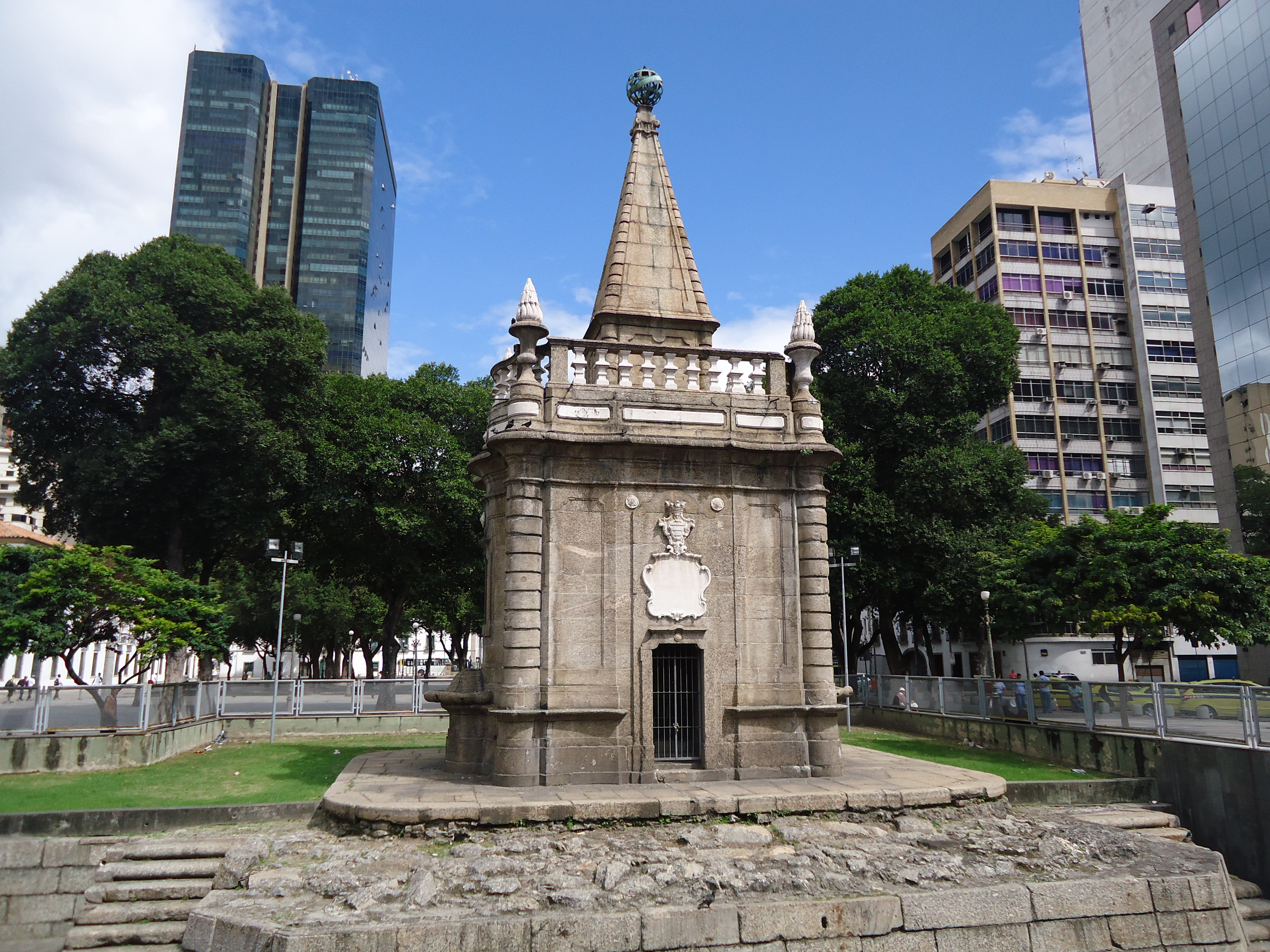 Praça XV, centro histórico do Rio de Janeiro, estado do Rio de Janeiro, Brasil: chafariz de Mestre Valentim.